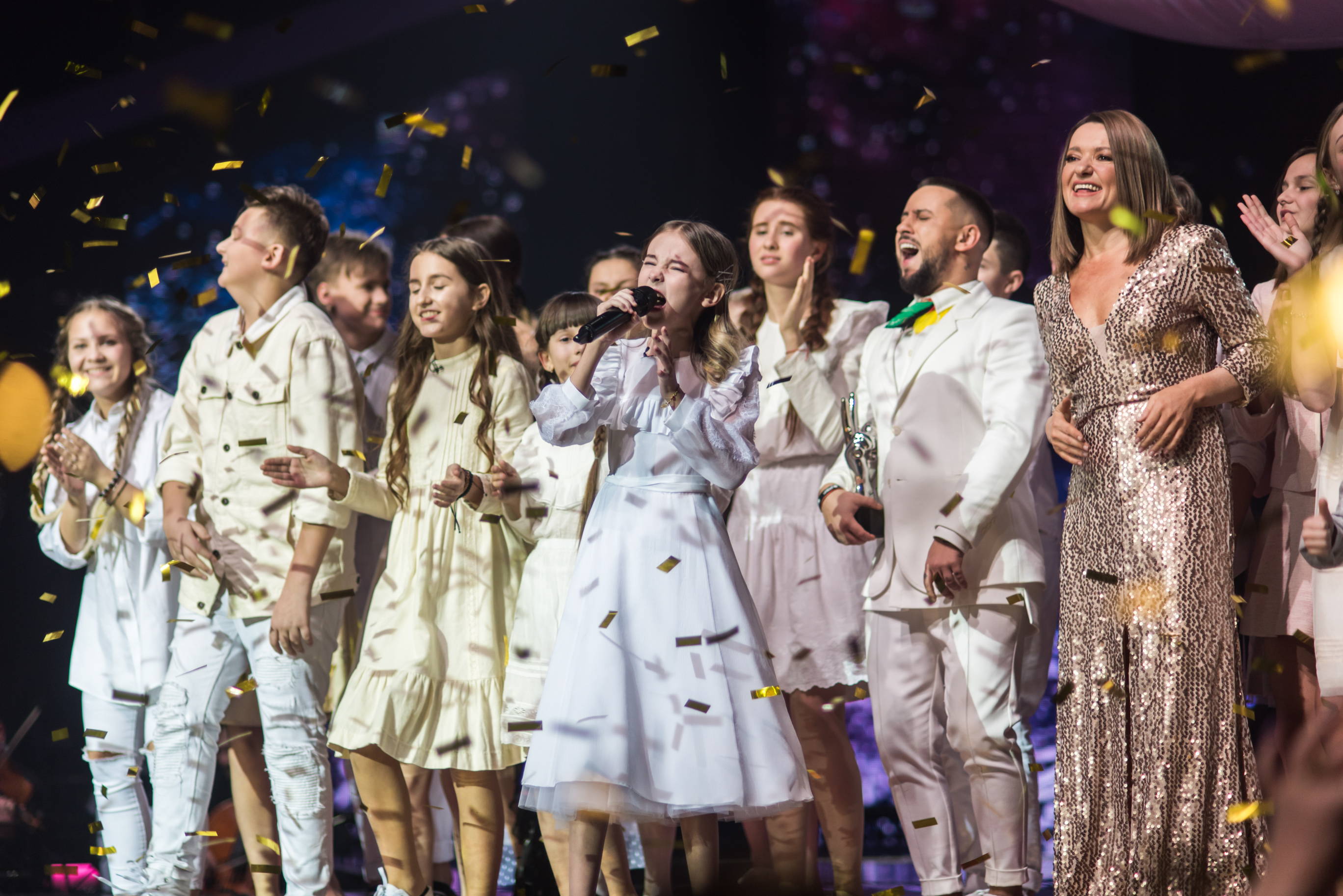 Финал Голос. Дiти 4. Песня победителя